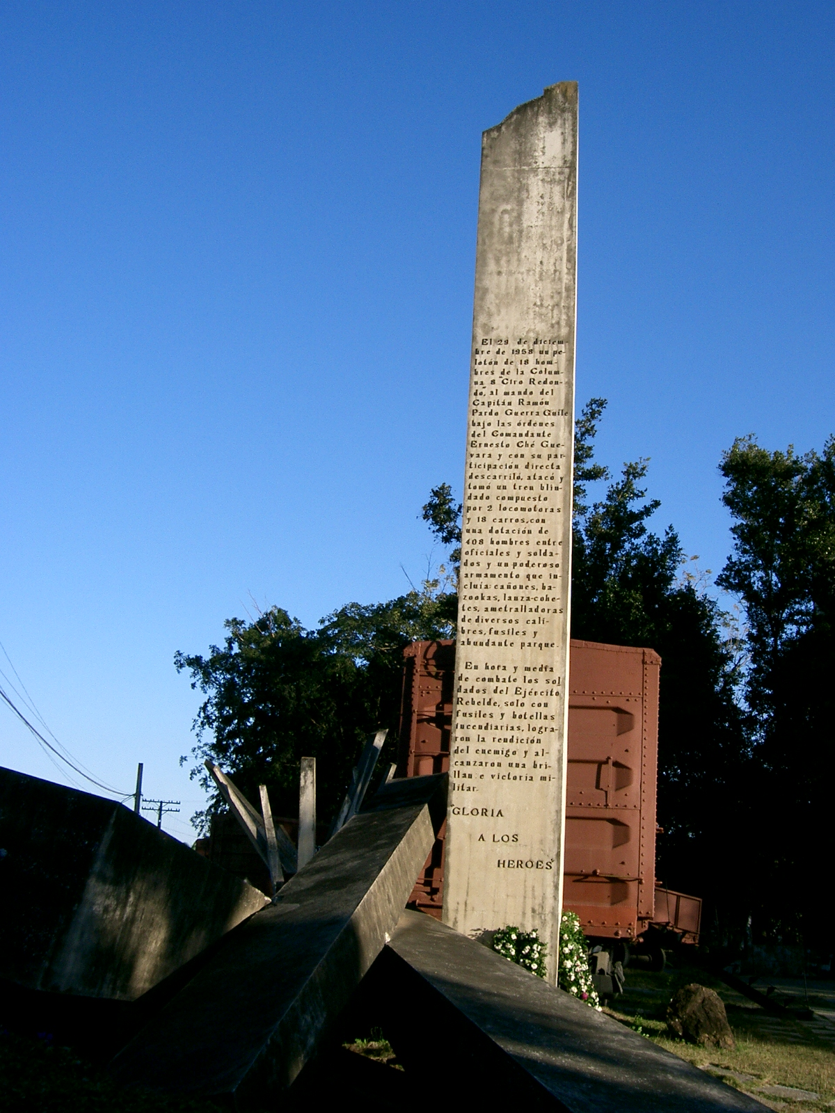 Cuba - Santa Clara - Stèle commémorant l'attaque victorieuse d'un train blindé par les guerilleros cubains commandés par Che Guevara